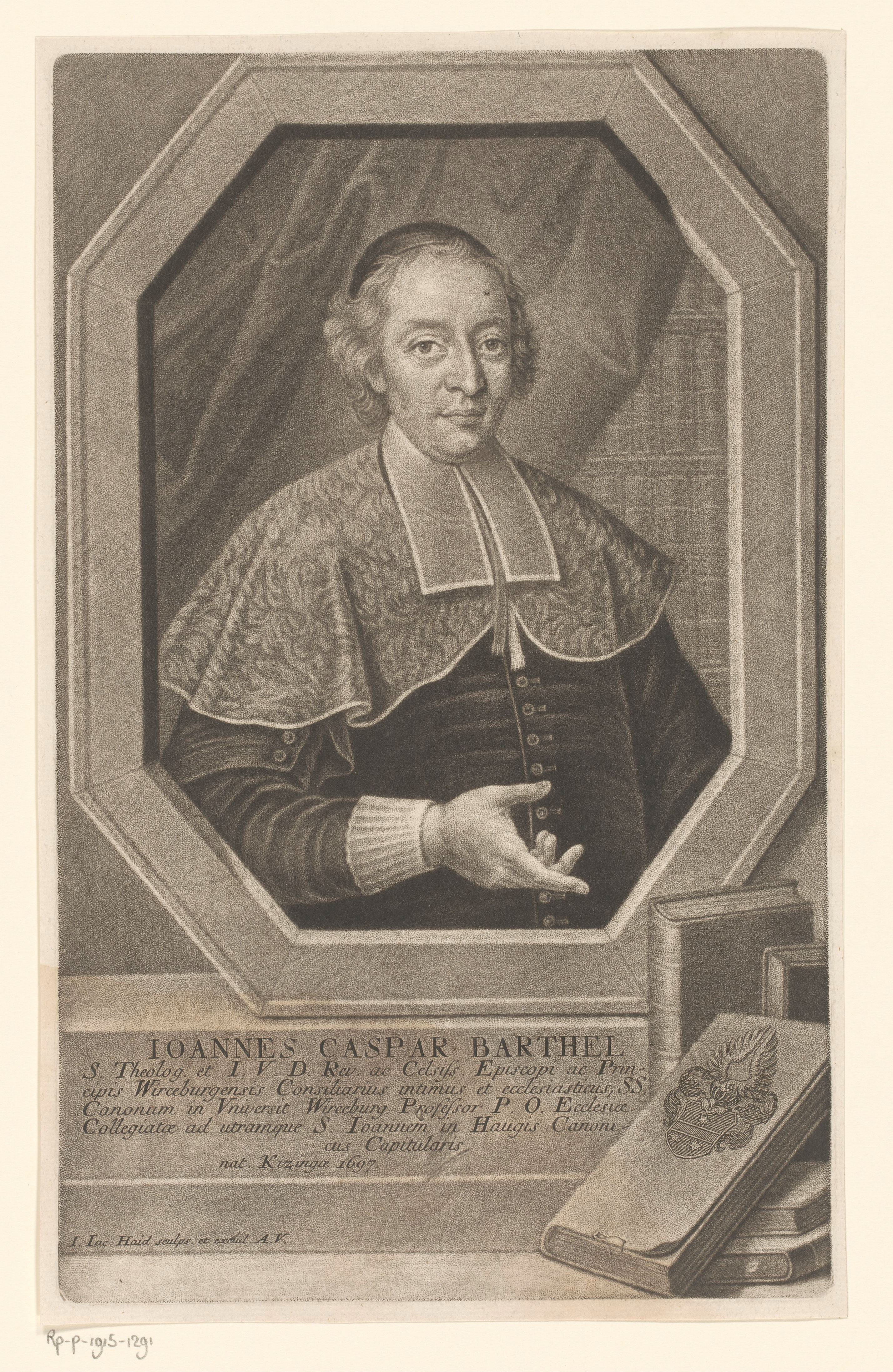 IdentificatieTitel(s): Portret van Johann Kaspar BarthelObjecttype: prent Objectnummer: RP-P-1915-1291Catalogusreferentie: LeBlancHABOpschriften / Merken: verzamelaarsmerk, verso, gestempeld: Lugt 2228Omschrijving: Met onderschrift in het Duits.VervaardigingVervaardiger: prentmaker: Johann Jacob Haid (vermeld op object)uitgever: Johann Jacob Haid (vermeld op object)Plaats vervaardiging: AugsburgDatering: 1714 - 1767Materiaal: papier Techniek: mezzotint / etsenAfmetingen: plaatrand: h 318 mm × b 197 mmOnderwerpWat: historical personsbookbookshelvesWie: Johann Kaspar BarthelVerwerving en rechtenVerwerving: aankoop 1905Copyright: Publiek domein